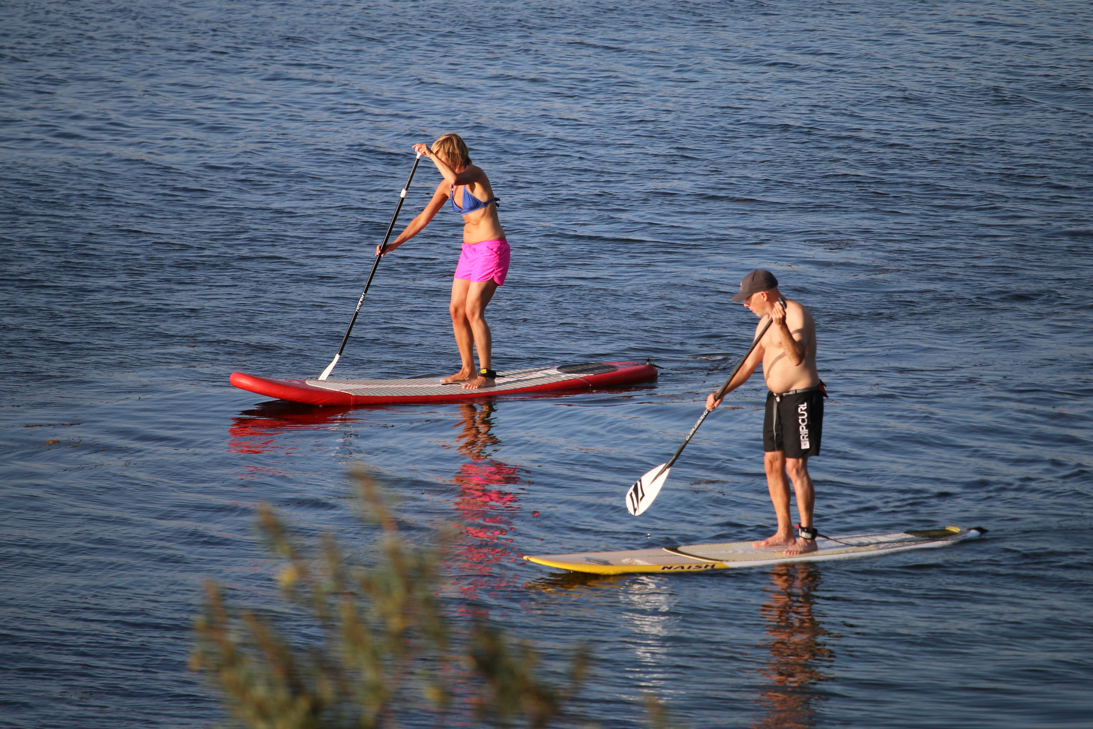 Stand up paddling Malmö